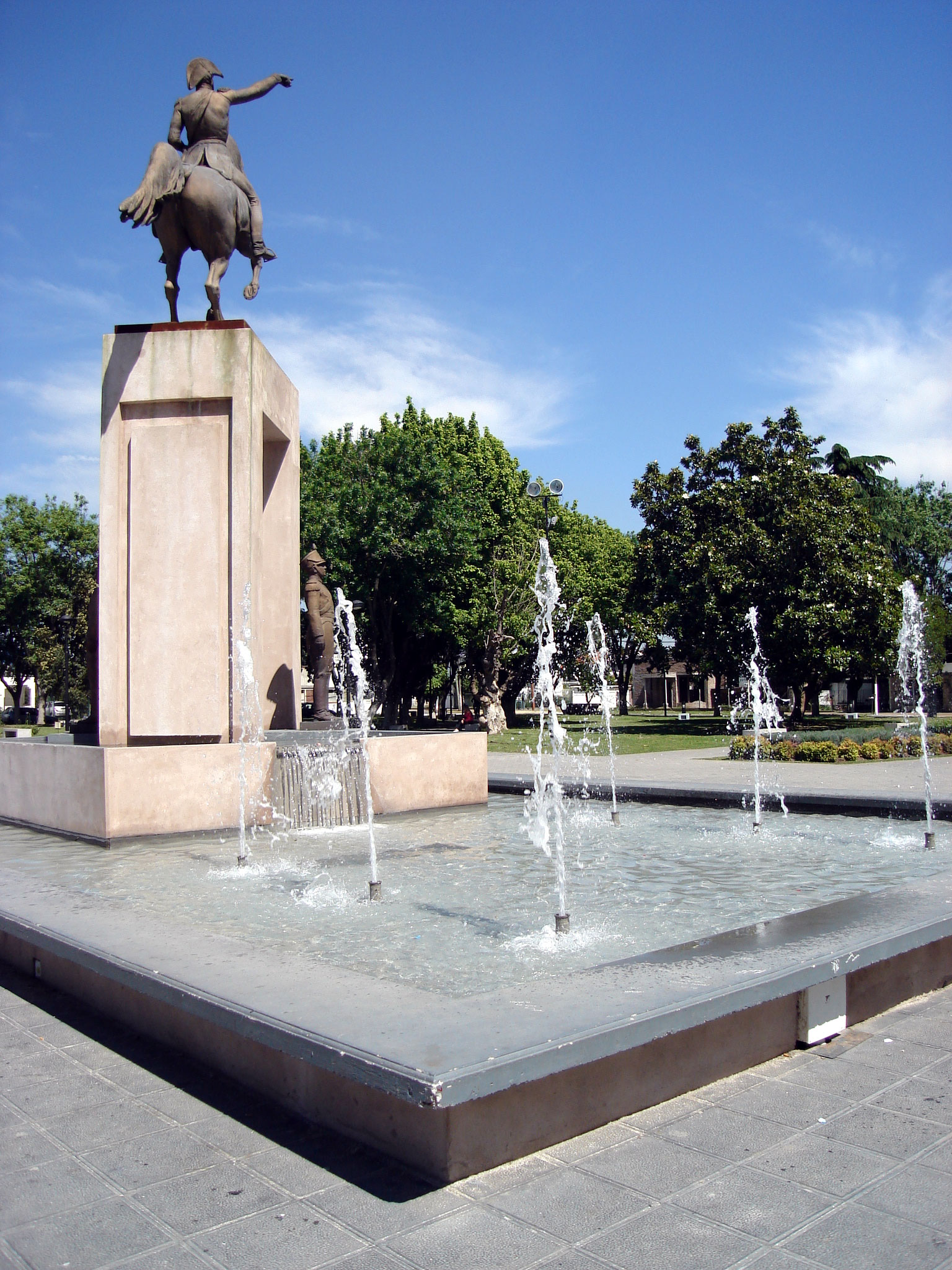 Fuente alrededor de un monumento a José de San Martín en la Plaza San Martín, localilidad de Berazategui, Buenos Aires, Argentina.